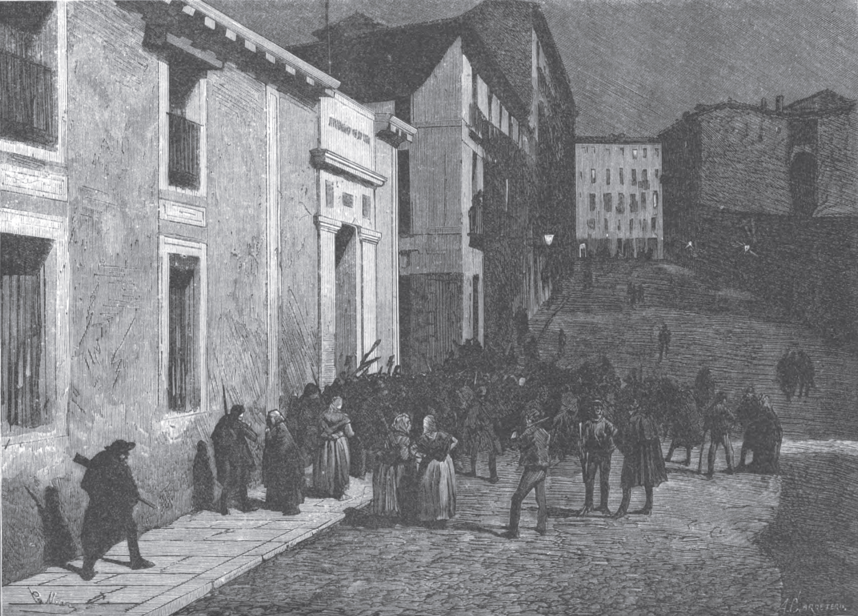 Madrid.—Motín en la noche del 11, una turba de sublevados invaden el Museo Arqueológico.